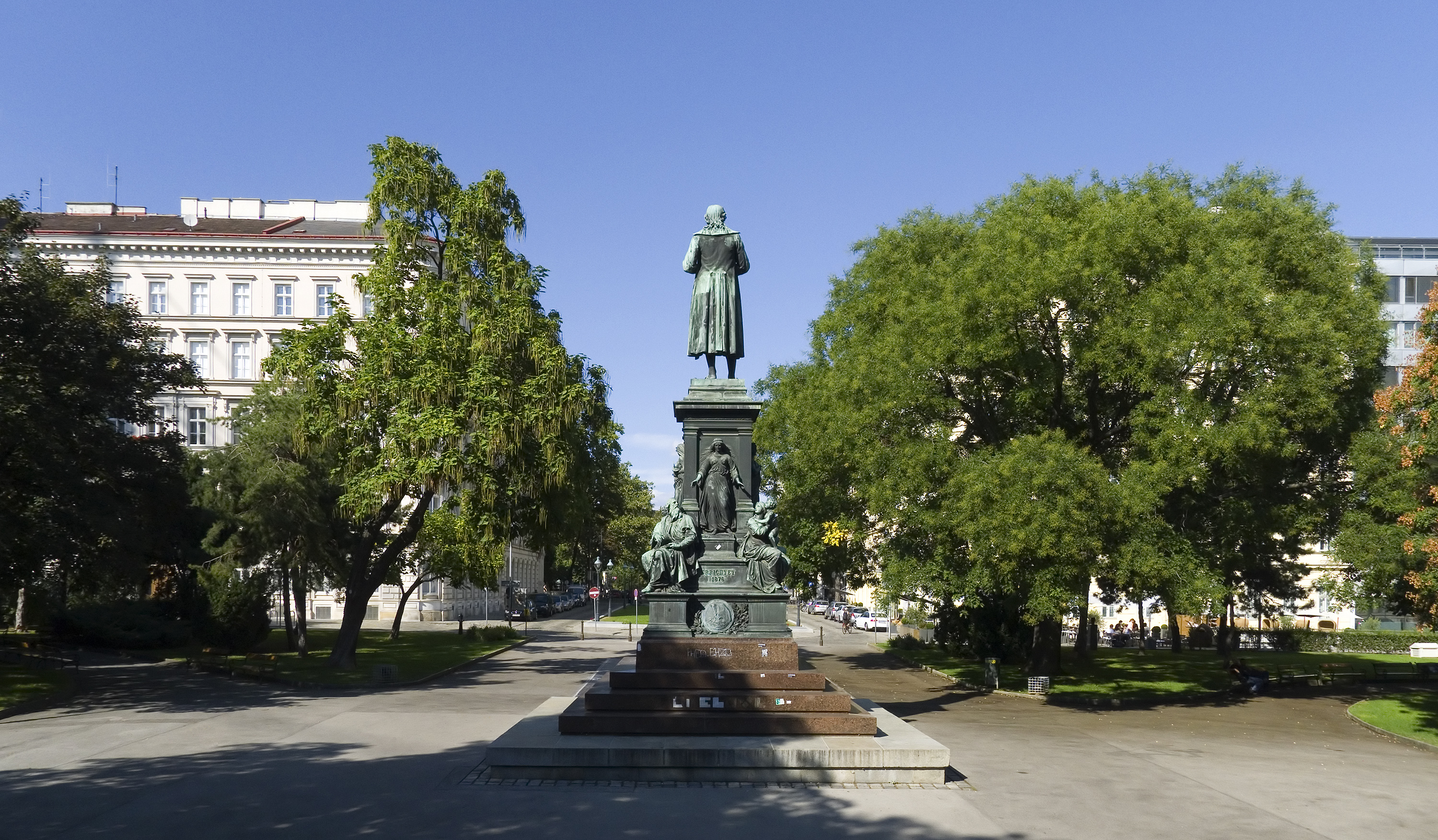 Schillerplatz in Wien 1 Richtung Norden